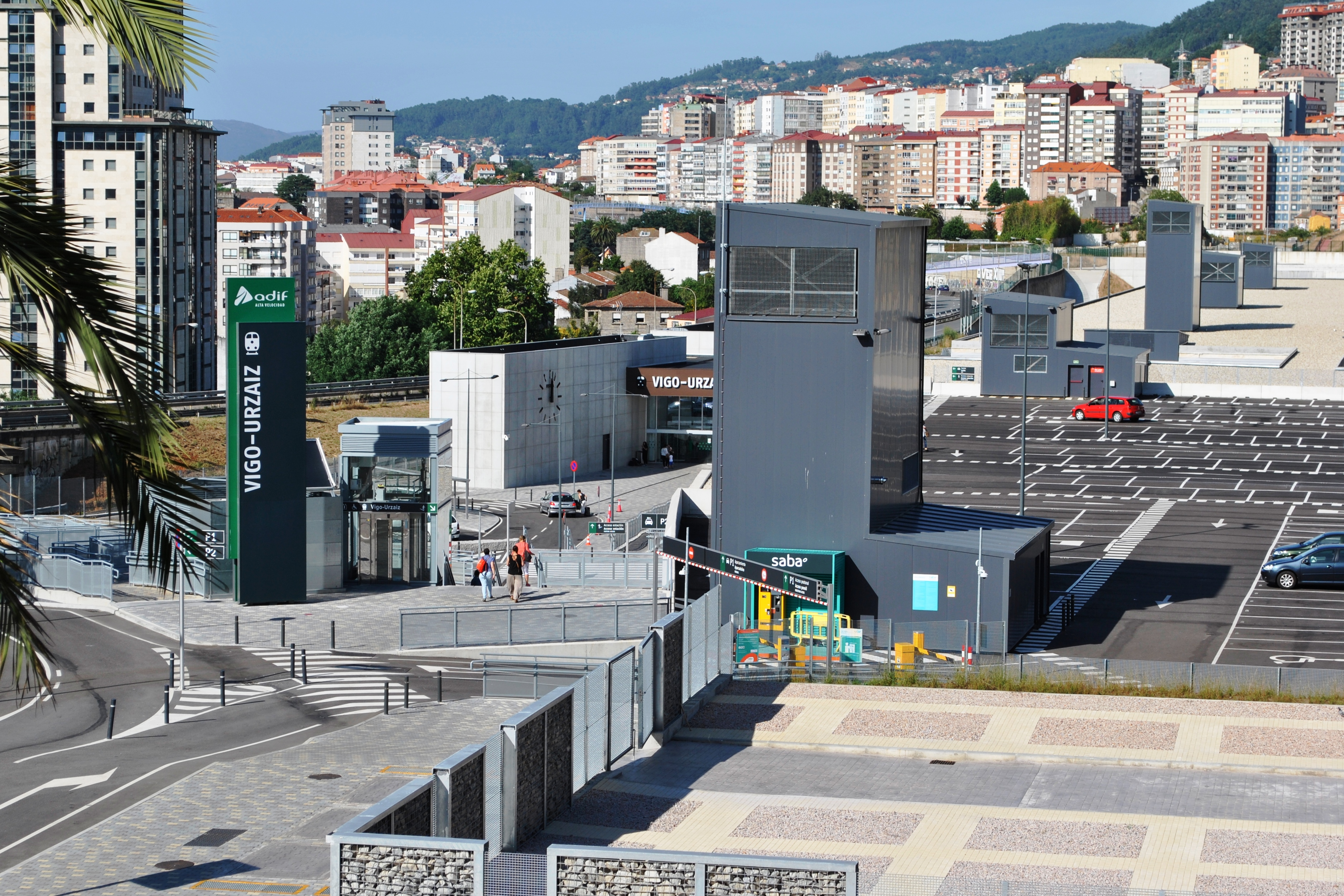 Véxase o título e as categorías.